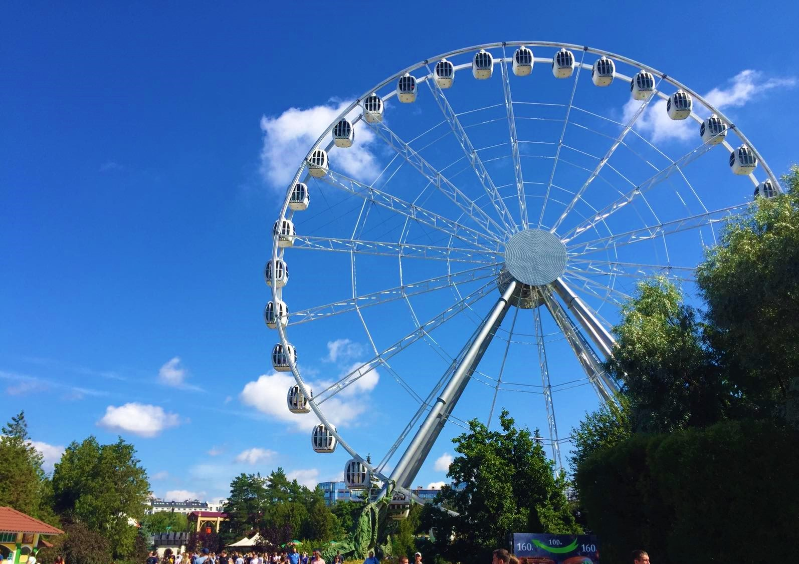 Ferris wheel in the Park Divo Ostrov, St. Petersburg